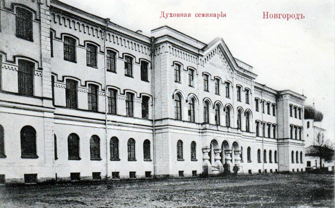 «Учебный корпус Новгородской духовной семинарии. Построен по проекту архитектора А.И. Борщова в 1890 г. Фото нач. ХХ в.»